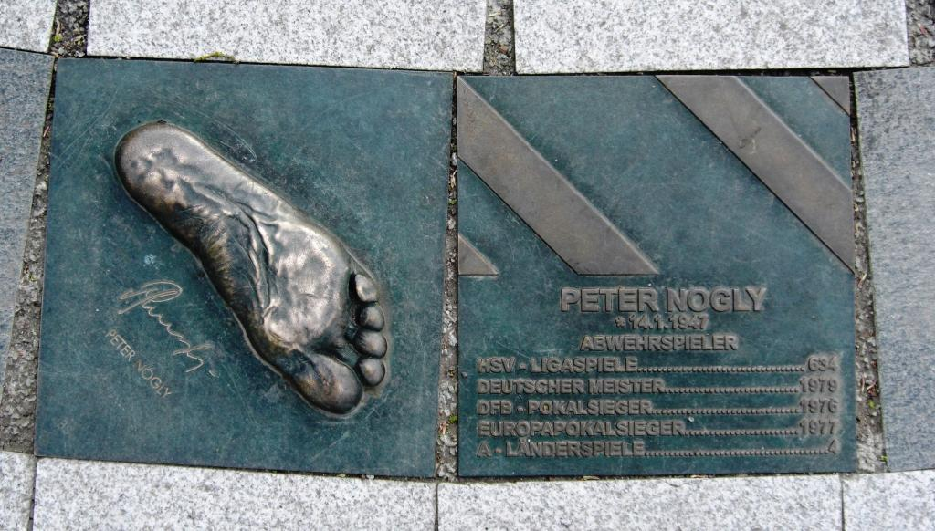 Ehrung für den deutschen Fußballspieler Peter „Eiche“ Nogly (* 14. Januar 1947 in Lübeck-Travemünde) vor dem HSV-Stadion in Hamburg.